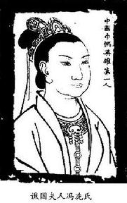 这是清代书籍上出现的冼夫人画像，早已进入公共领域。